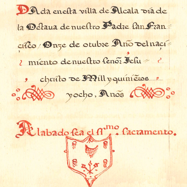 Constituciones del 11 de octubre de 1508 del monasterio de San Juan de la Penitencia, de la Tercera Orden de San Francisco. Otorgadas en Alcalá de Henares, por el Arzobispo de Toledo y primado de las España el Cardenal Cisneros. Documento que consta de 32 páginas.